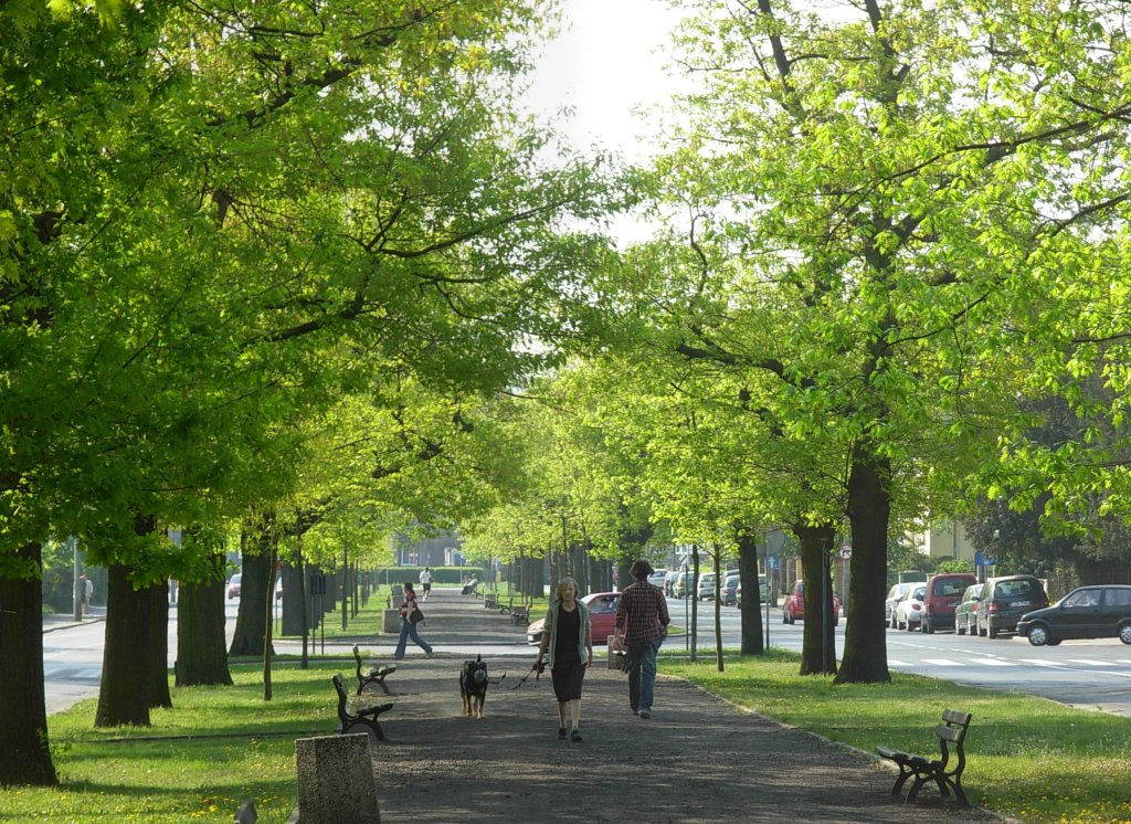 Aleja Ossolińskich w Bydgoszczy